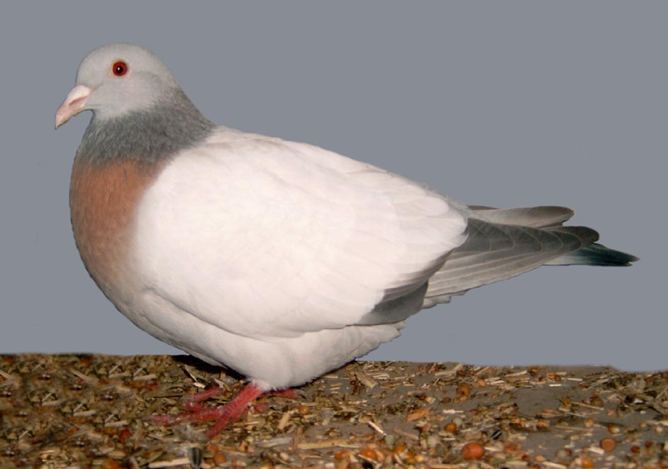 Coburg Lark